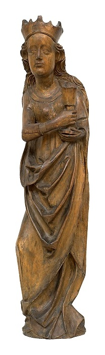 Sv. Barbora (po r. 1510), Cheb